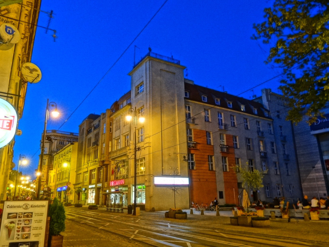 Ulica Gdańska w Bydgoszczy